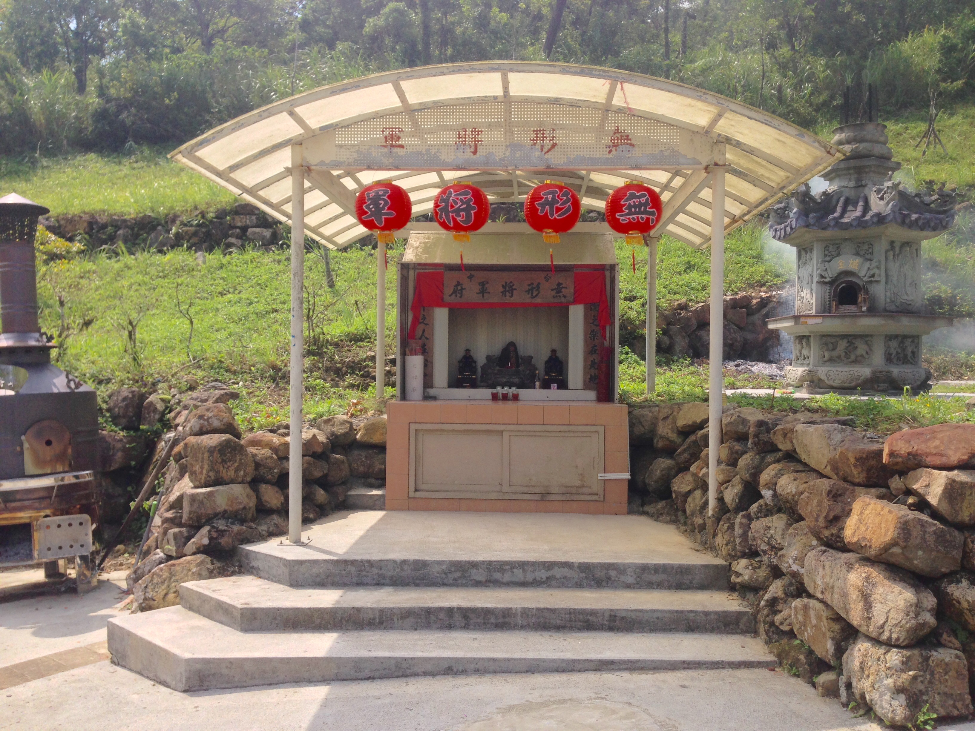 中文（台灣）: 無形將軍府